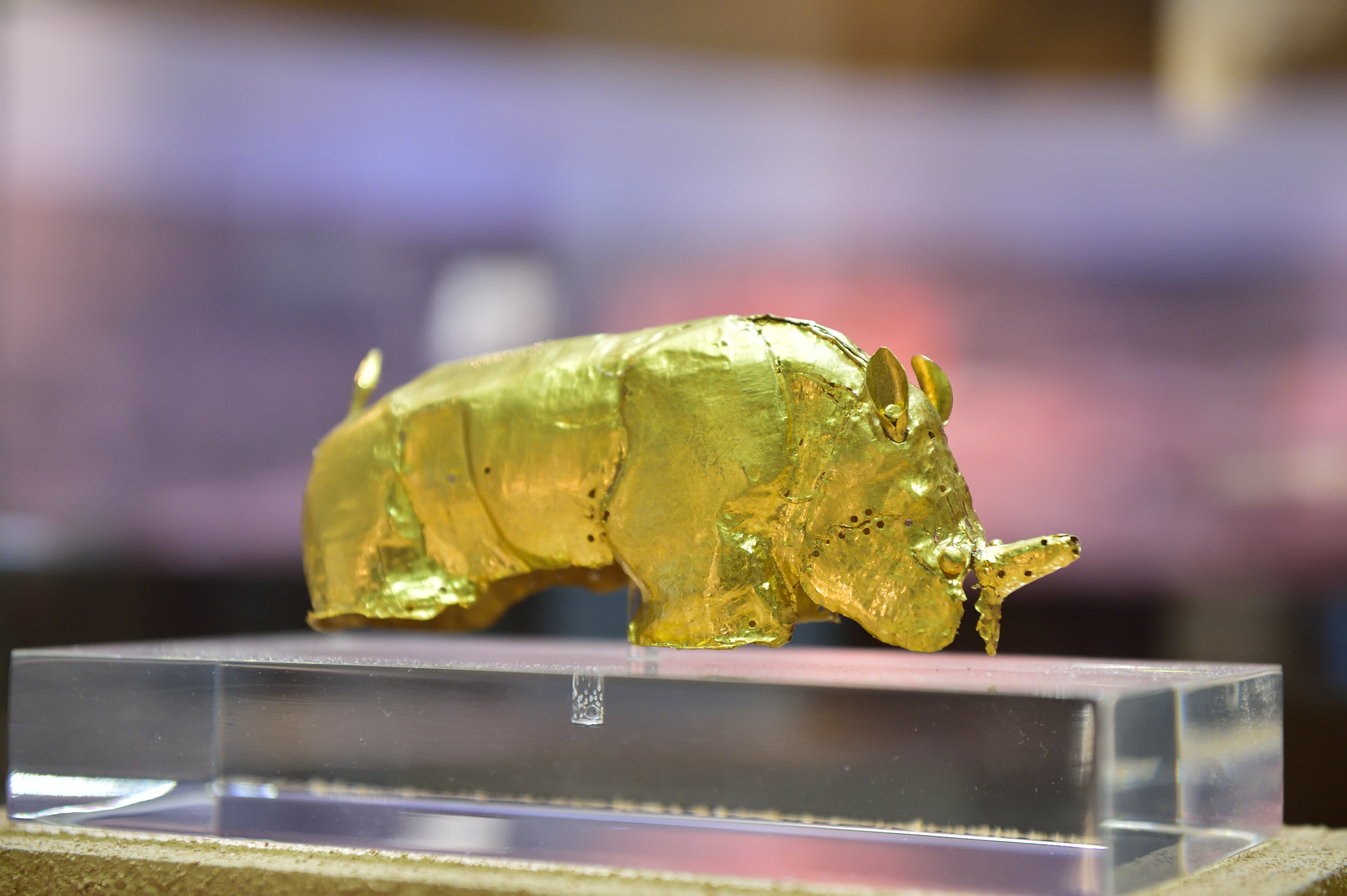 Vue du Limpopo en Afrique du Sud.